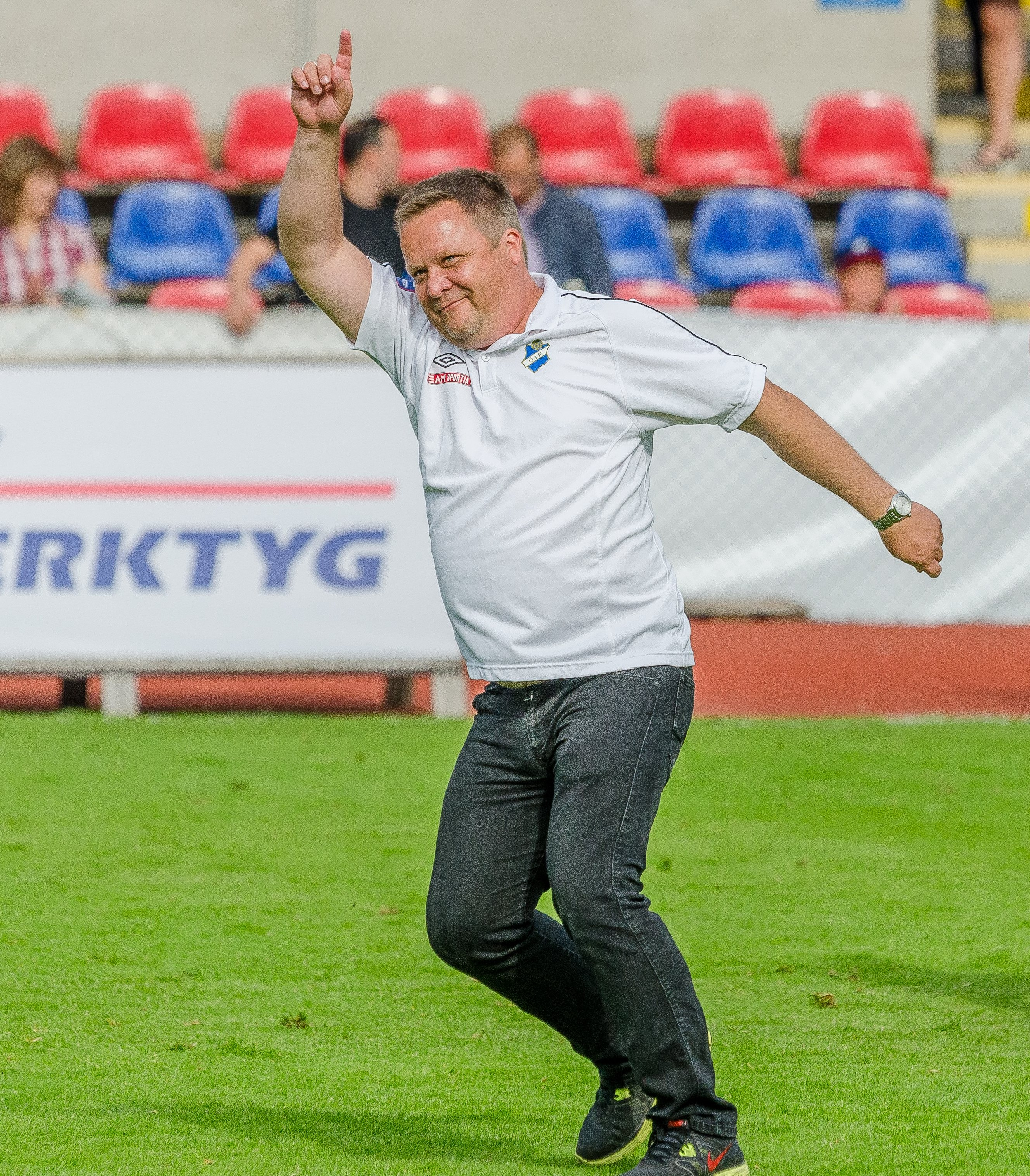 Östers IF:s tränare Roar Hansen avslutar sin traditionsenliga segerdans med ett "Brolin-hopp" efter segern mot Degerfors som innebar att Öster gick obesegrade genom vårsäsongen 2012.